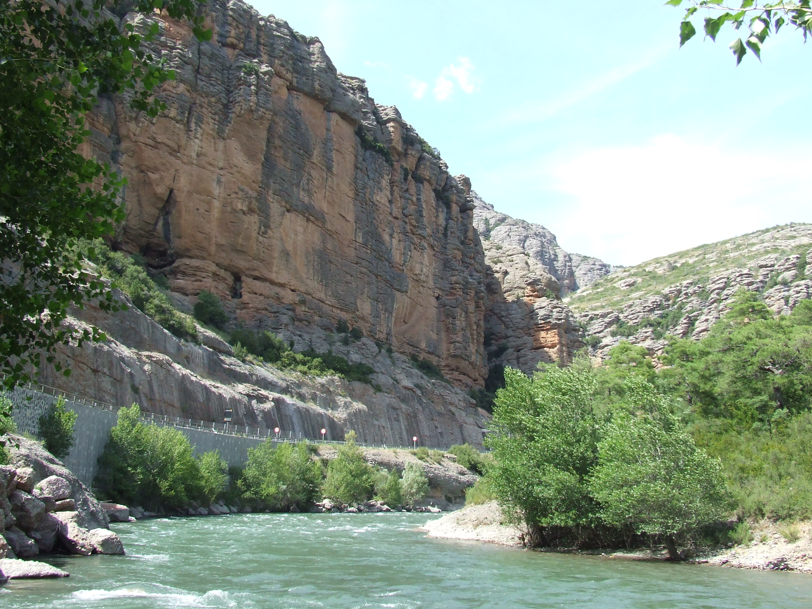 La Noguera Pallaresa sortint de Collegats.